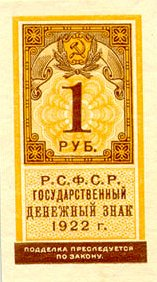 рубль-марка 1922. РСФСР. Аверс. Односторонний (реверс пустой).